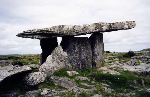 Poulnabrone